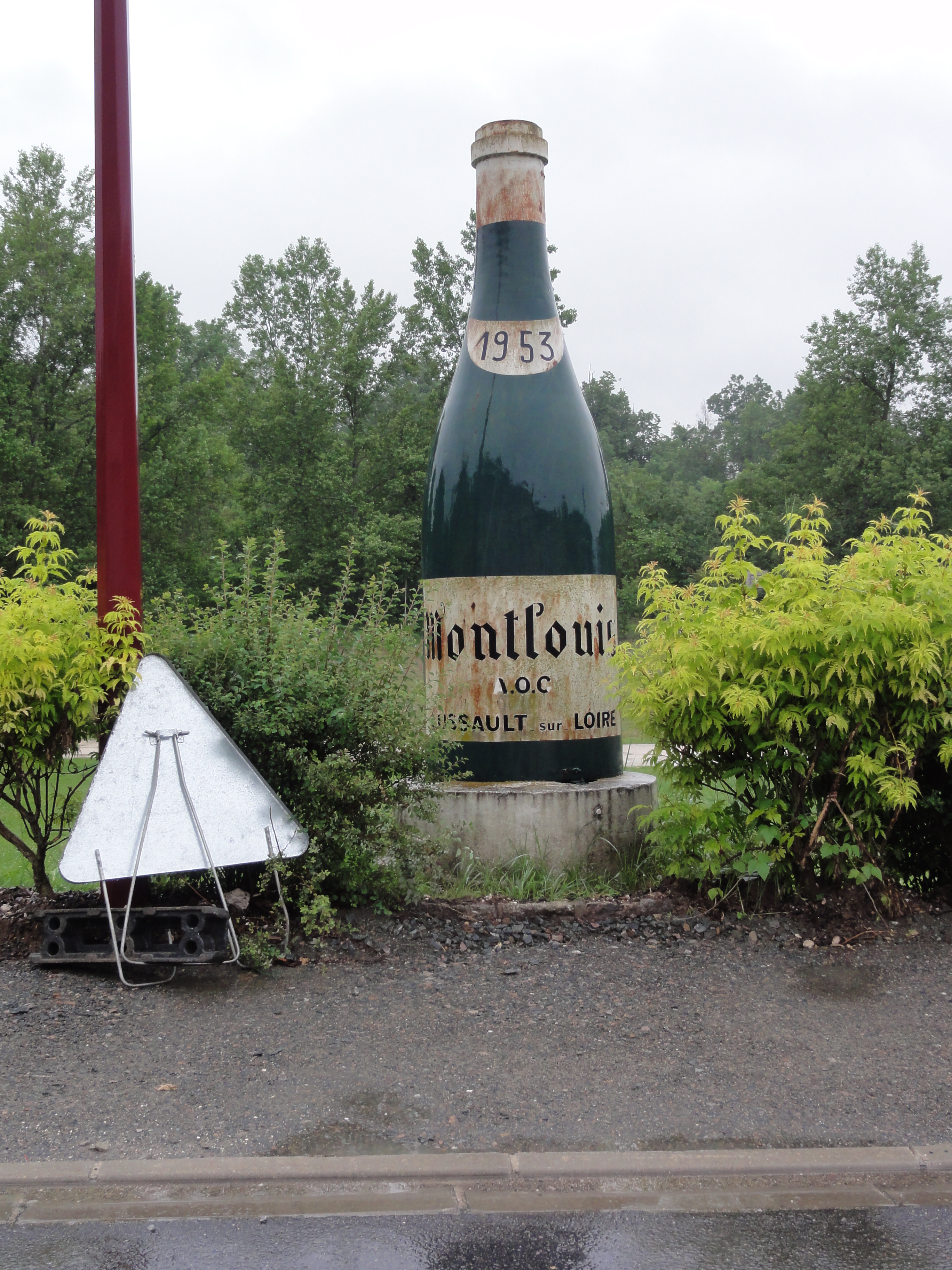 Lussault-sur-Loire (Indre-et-Loire) bouteille Montlouis AOC à Lussault